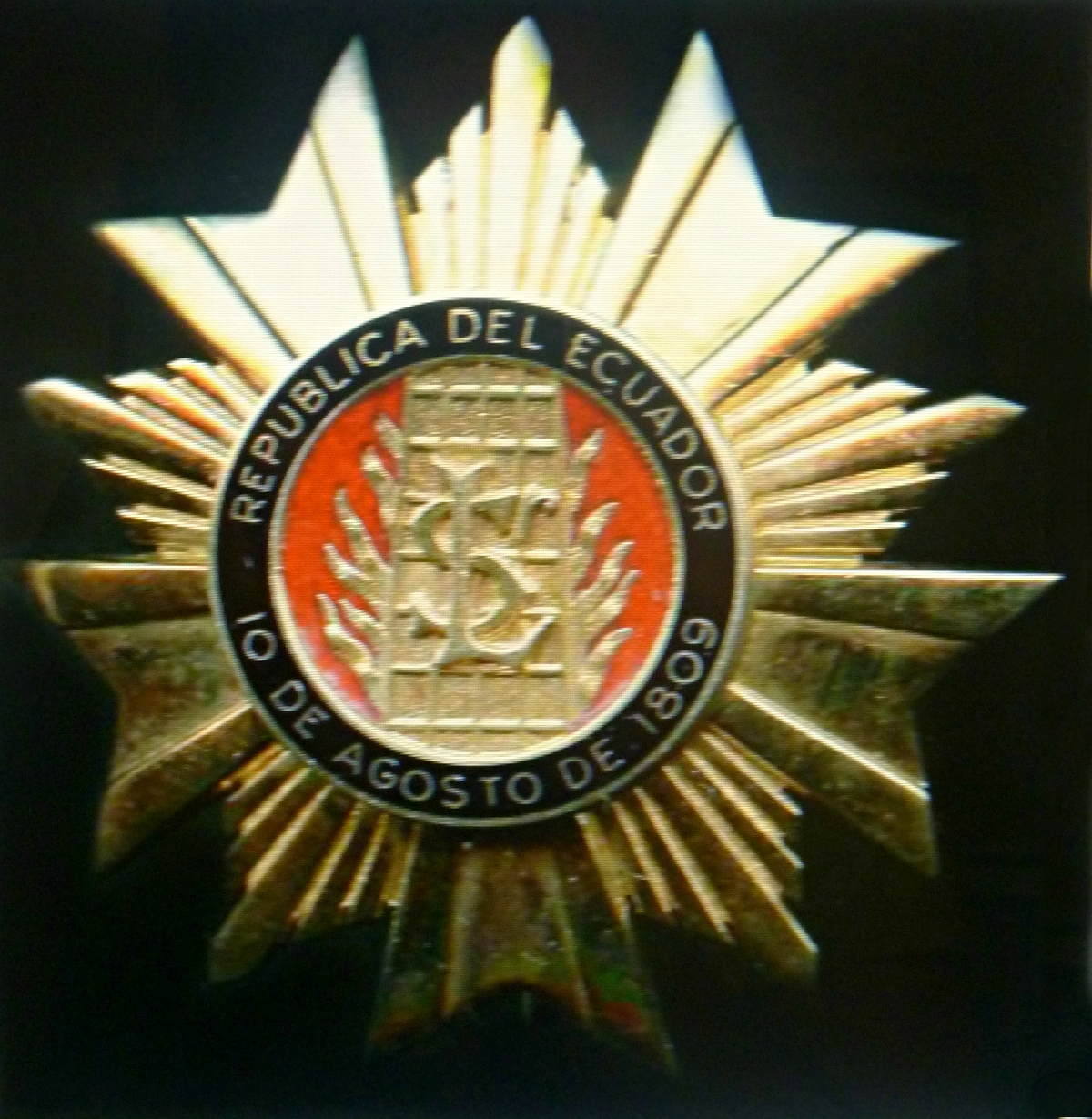 Venera de la Gran Cruz de la Orden de San Lorenzo, que se usó hasta el año 2001, cuando fue cambiada por el presidente Gustavo Noboa Bejarano, quien le añadió esmalte rojo a la cruz.